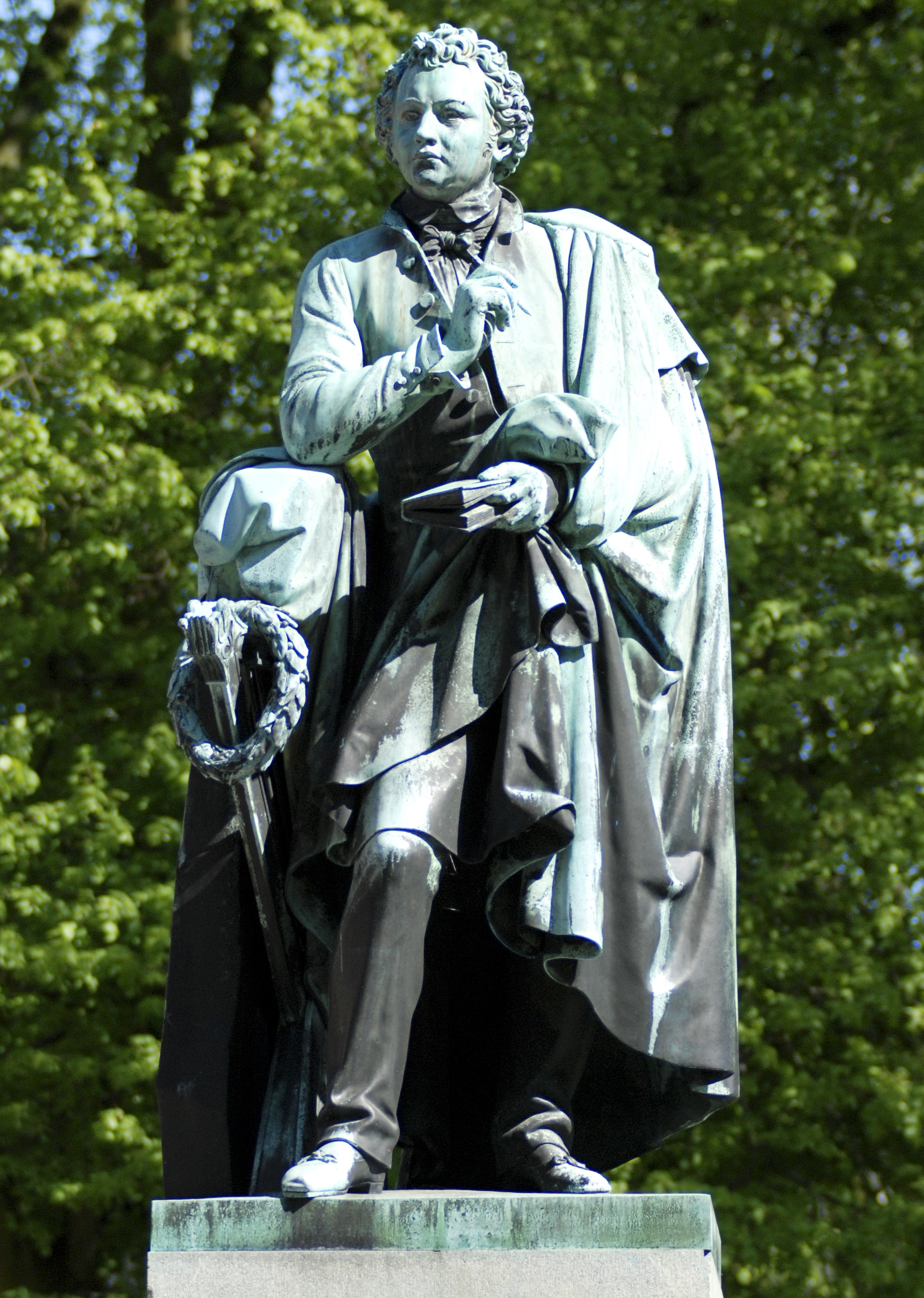 Staty av Esaias Tegnér i Lundagård.